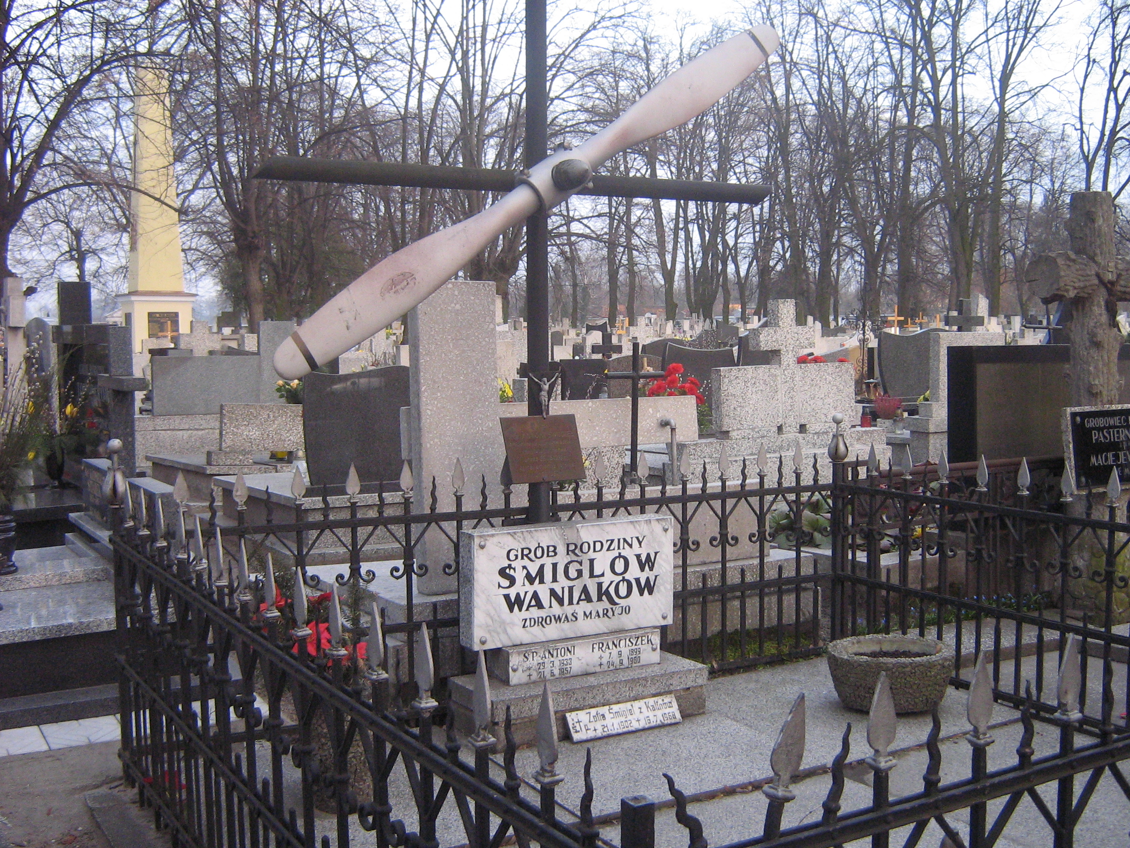 Grobowiec rodzinny inż. Antoniego Śmigla